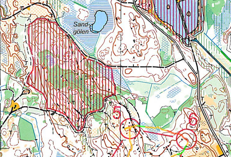 Oringen-etapp1 hr